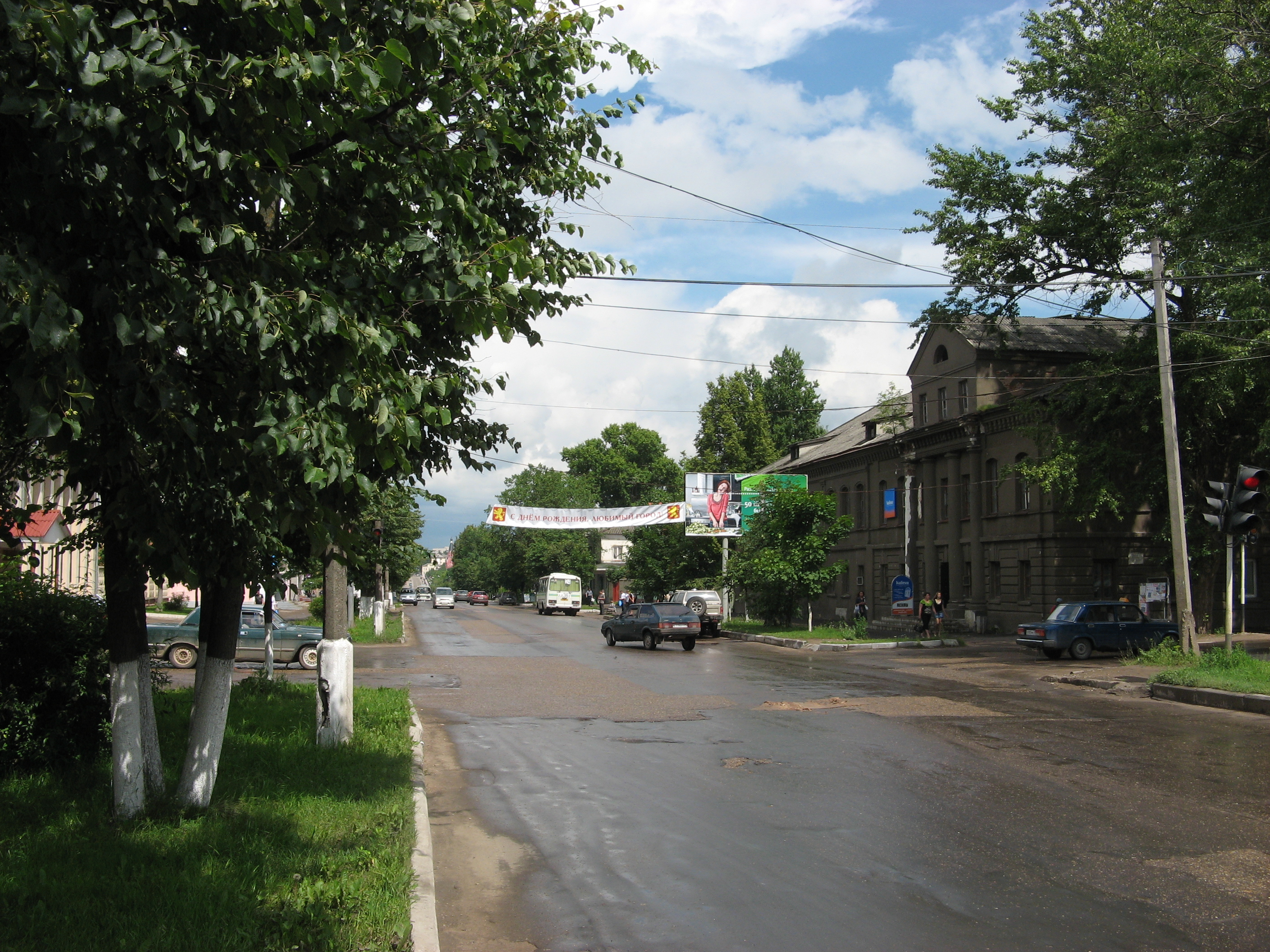 Большая Спасская улица в Ржеве